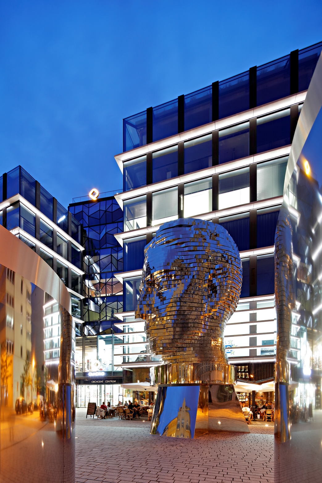 Socha F. Kafky